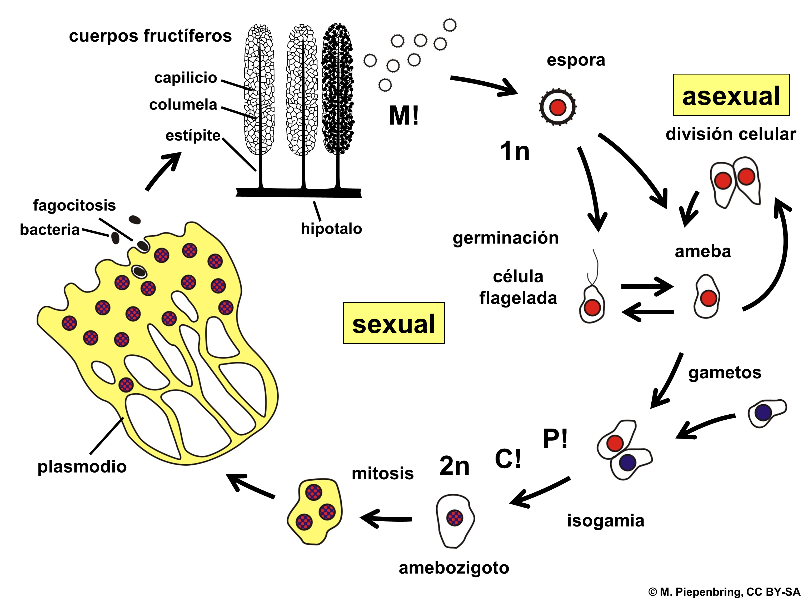 Biologische Schemata, gezeichnet und freigegeben von M. Piepenbring